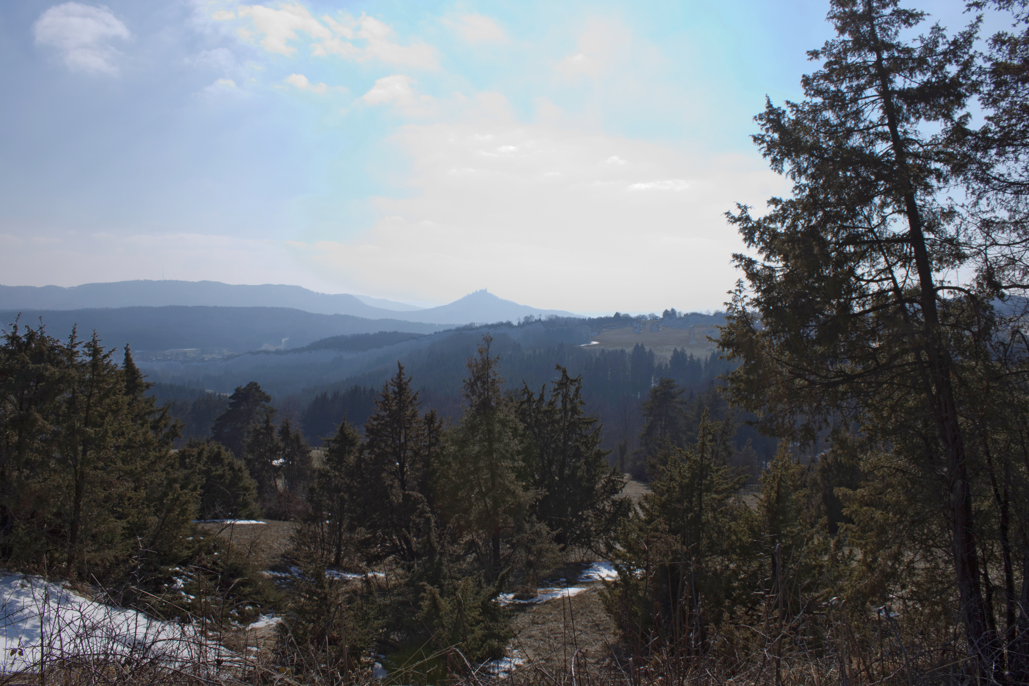 Teilstück der Beurener Heide mit Blick auf die Burg Hohenzollern